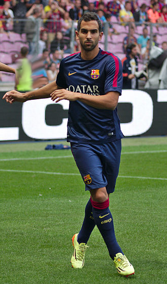 Barça - Napoli - 20140806 - Martin Montoya